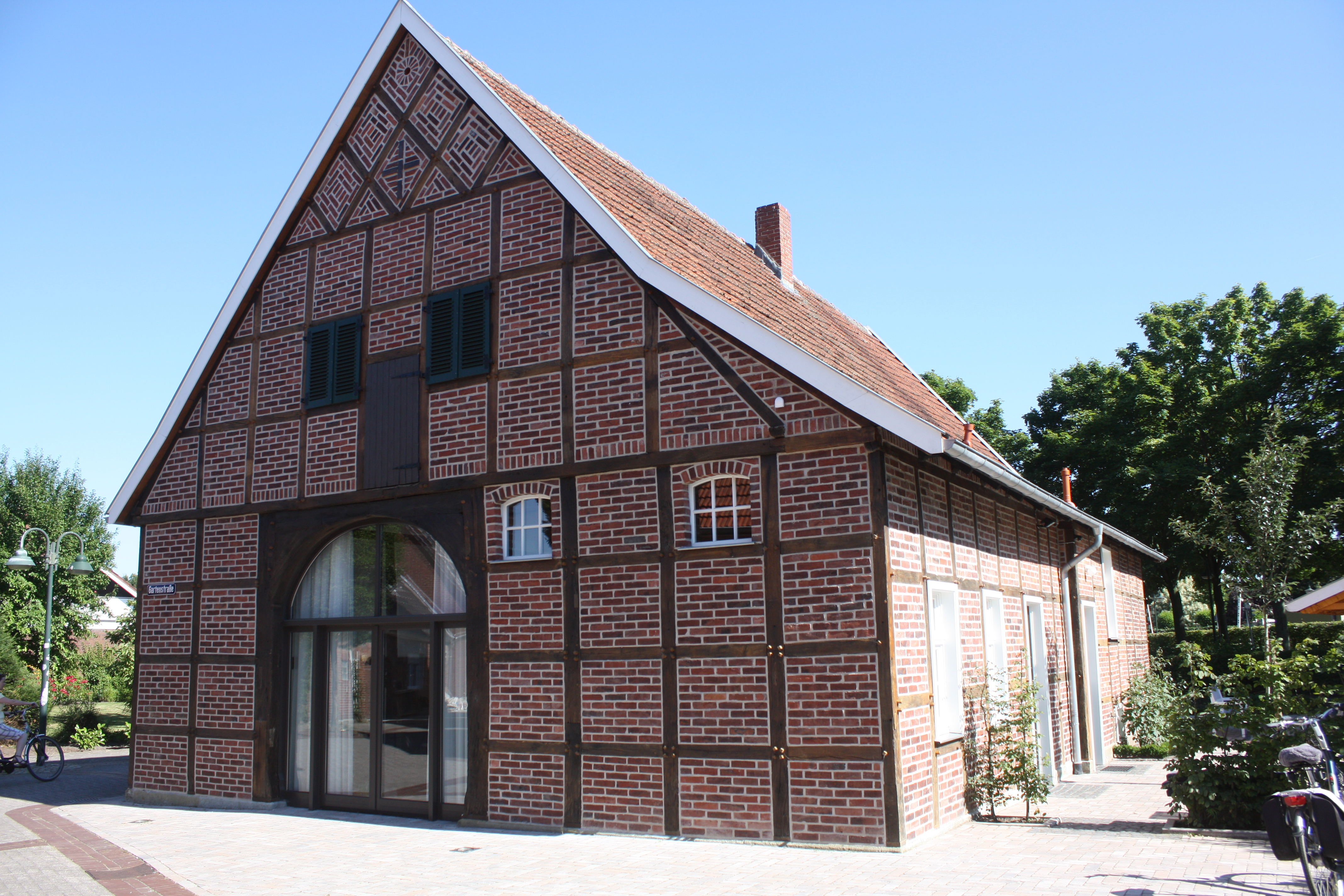 Haus Heuer, Gartenstraße 18 in Beelen